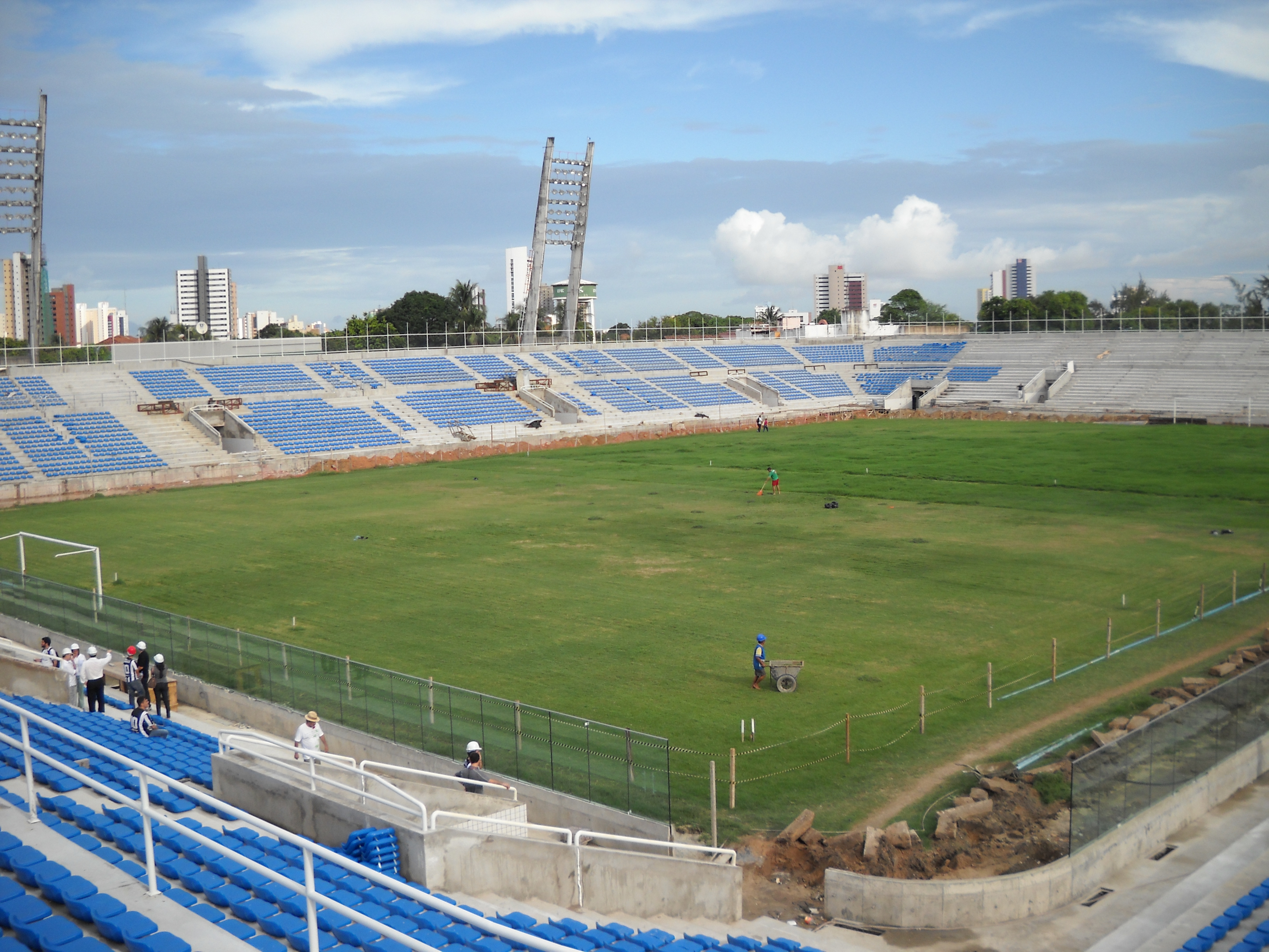 Estádio Presidente Vargas, em Fortaleza, Ceará, durante as reformas para se adequar ao Padrão FIFA.